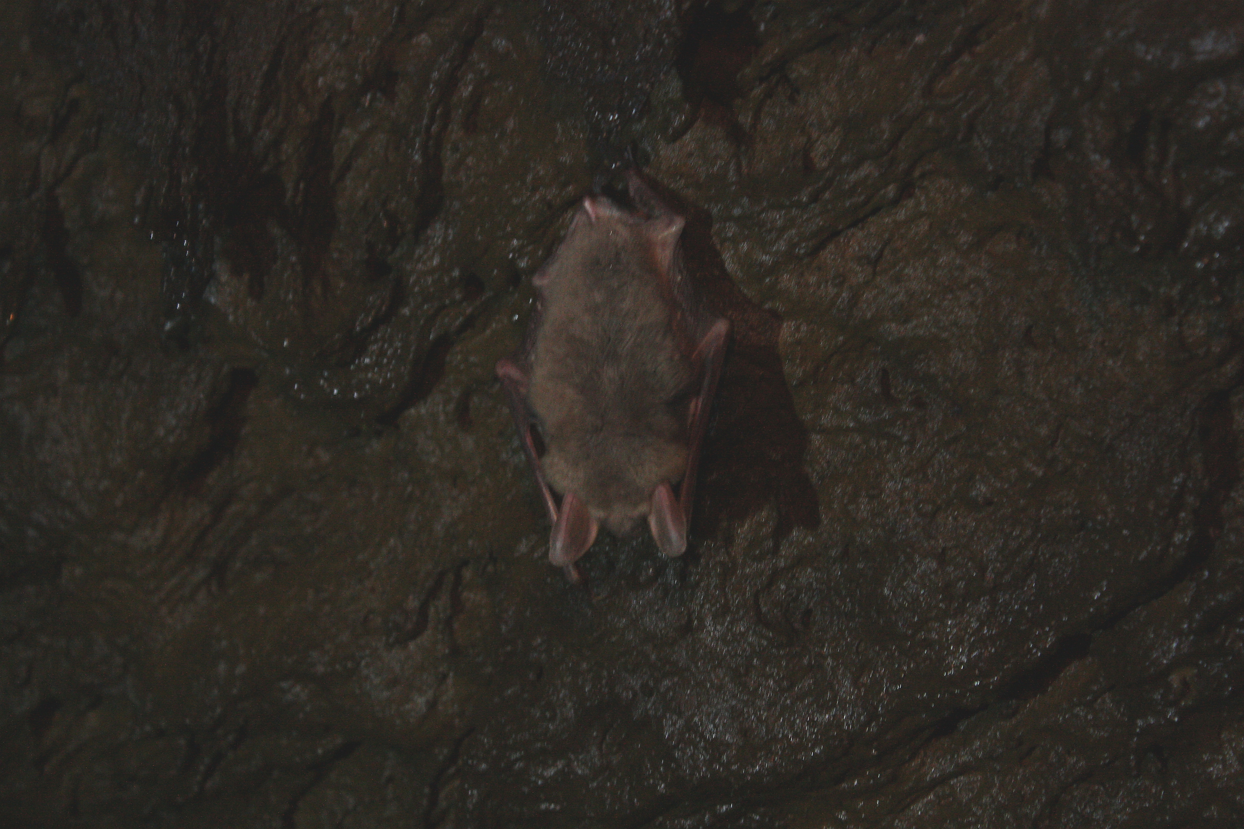 Myotis myotis dentro la Grotta Tre Livelli, Etna.